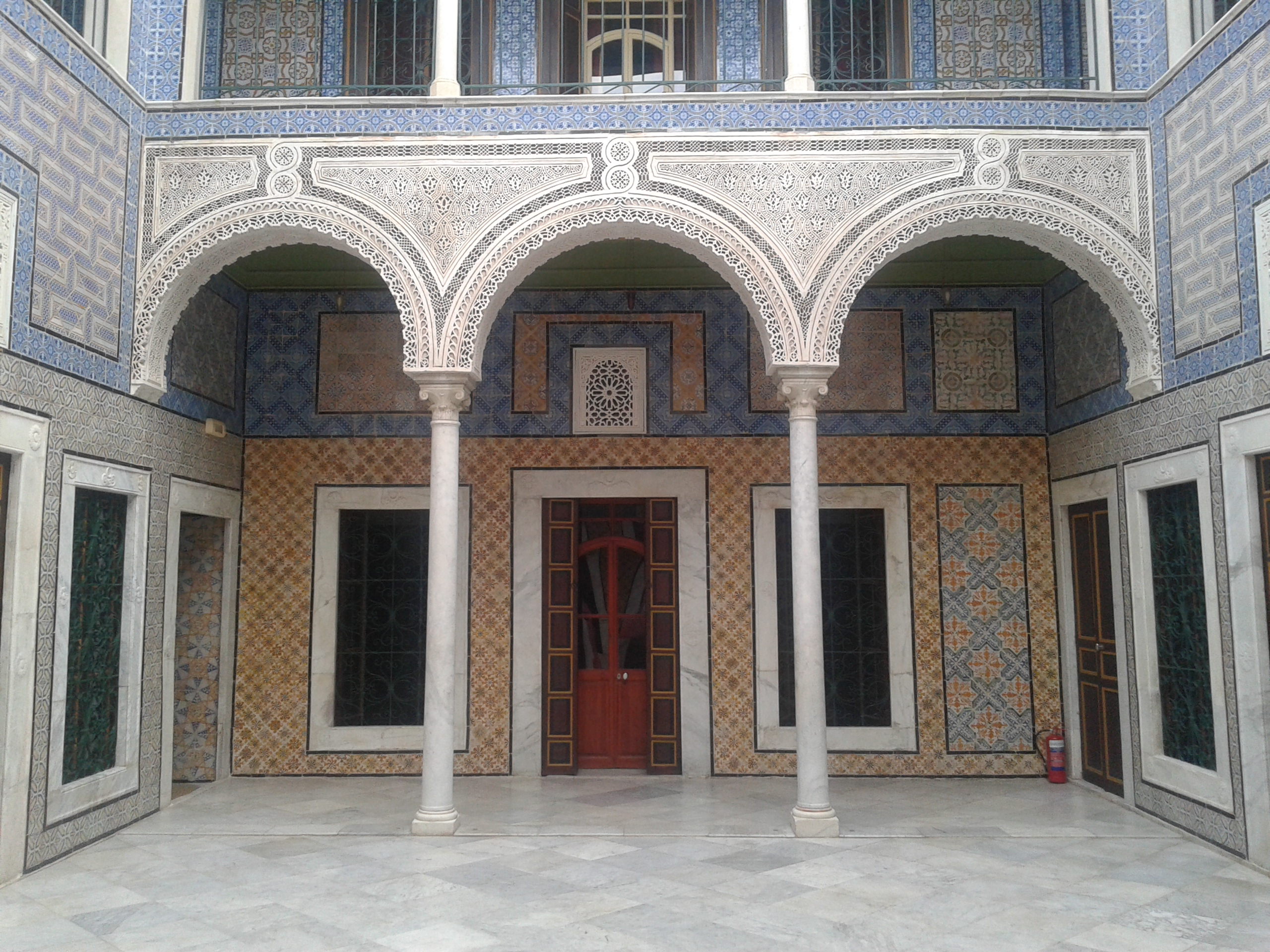 Patio du dar Bayram